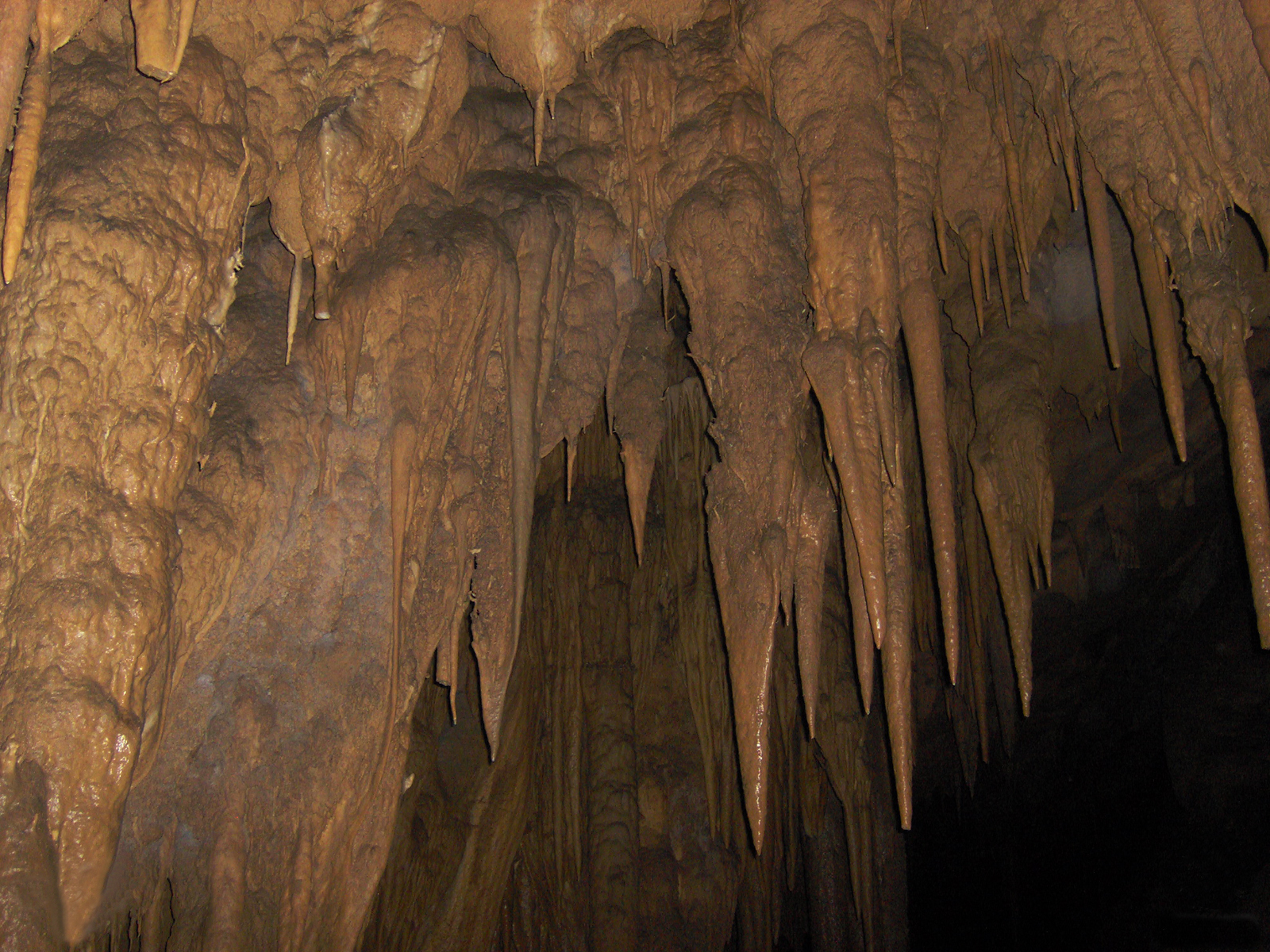 Fotografía tomada desde muy adentro de esta hermosa Cueva.